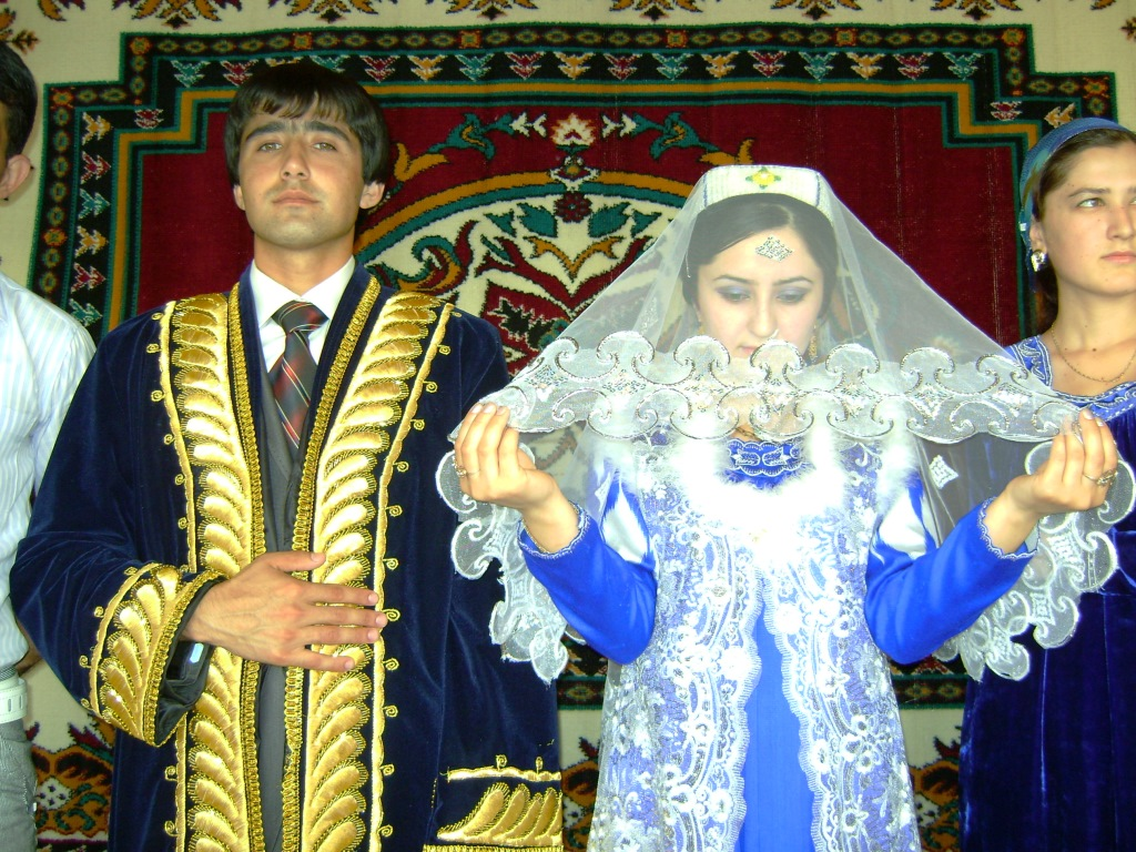 Свадебная церемония в Гиссарском районе Таджикистана,2015 год Тоҷикӣ: Маросими тӯйи никоҳ дар ноҳияи Ҳисори Тоҷикистон, соли 2015